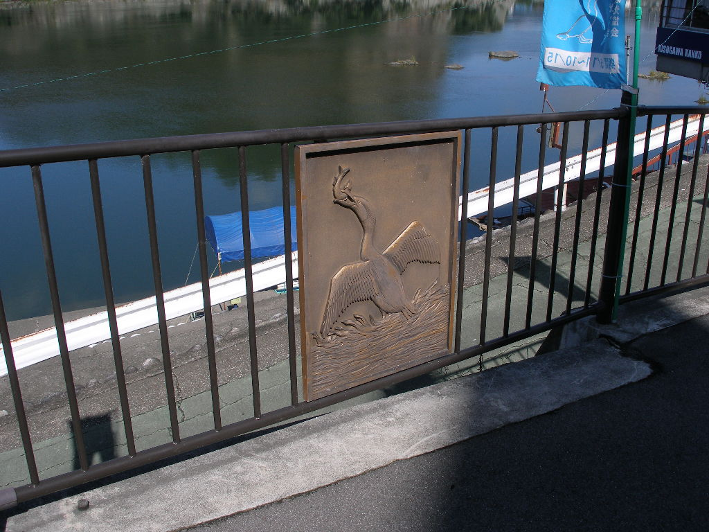 Ukai Kisogawa（木曽川うかい）,Inuyama,Aichi(愛知県犬山市)で撮影。木曽川のw:ja:鵜飼。